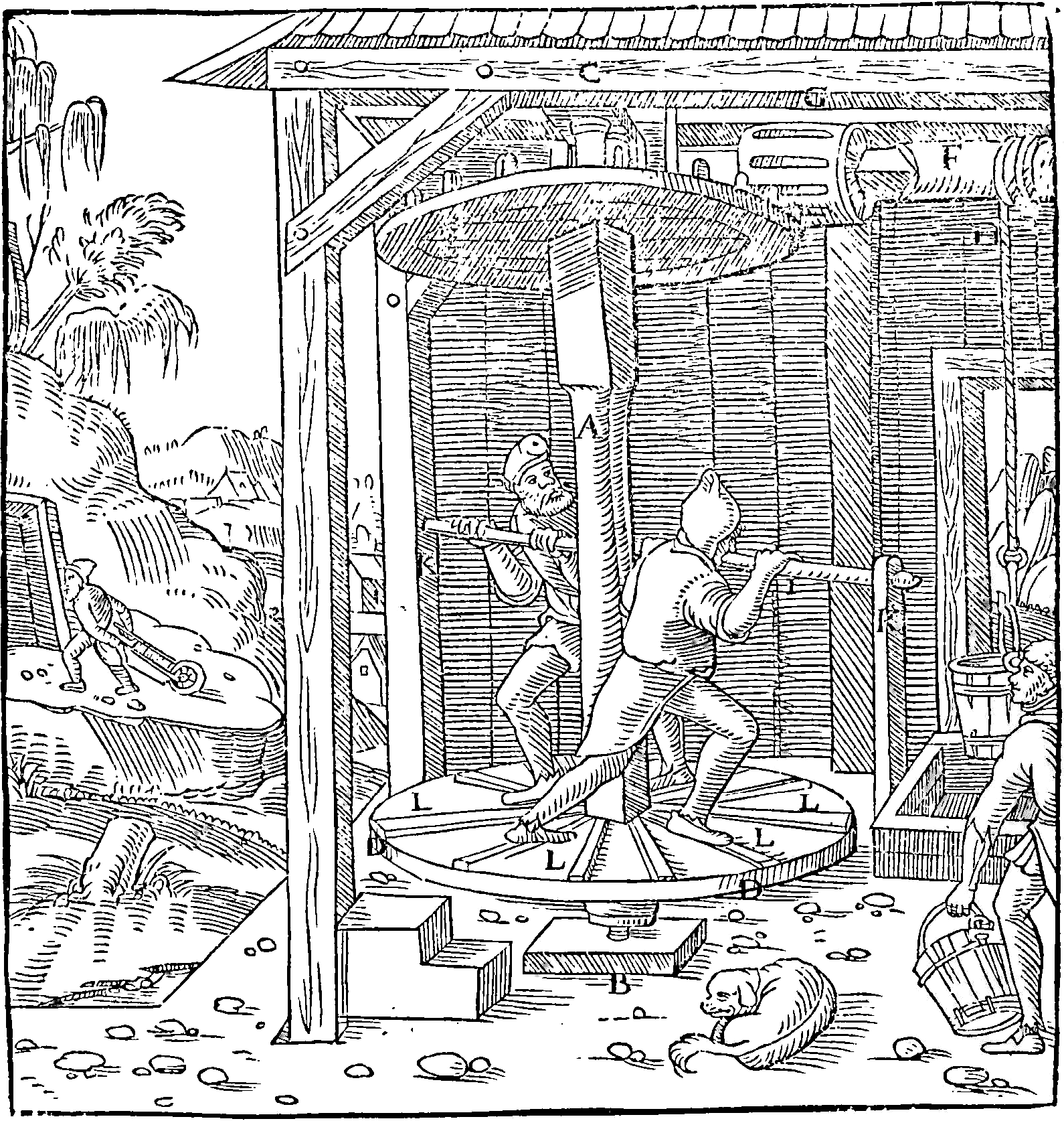 Incisione da De re metallica di Georg Agricola, Basilea, 1556